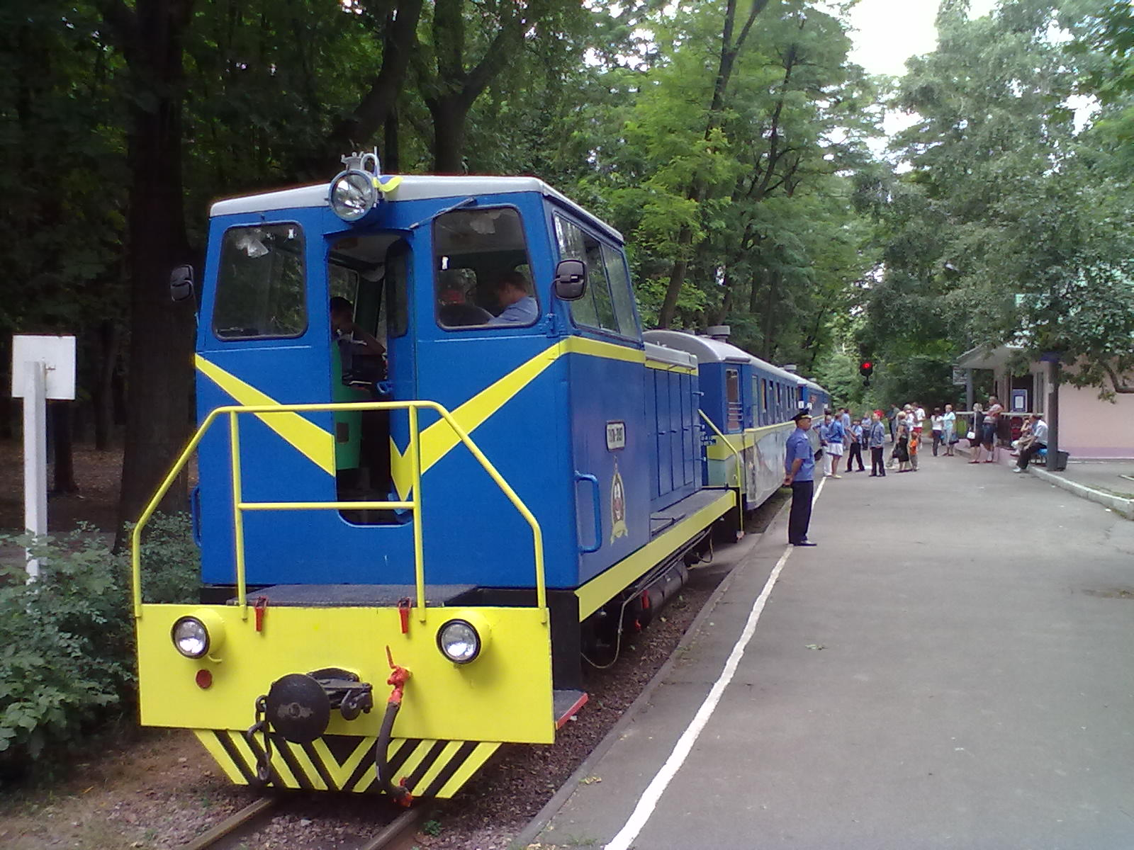 Детская Железная Дорога, ст. Яблонька, Киев. 2012 г.